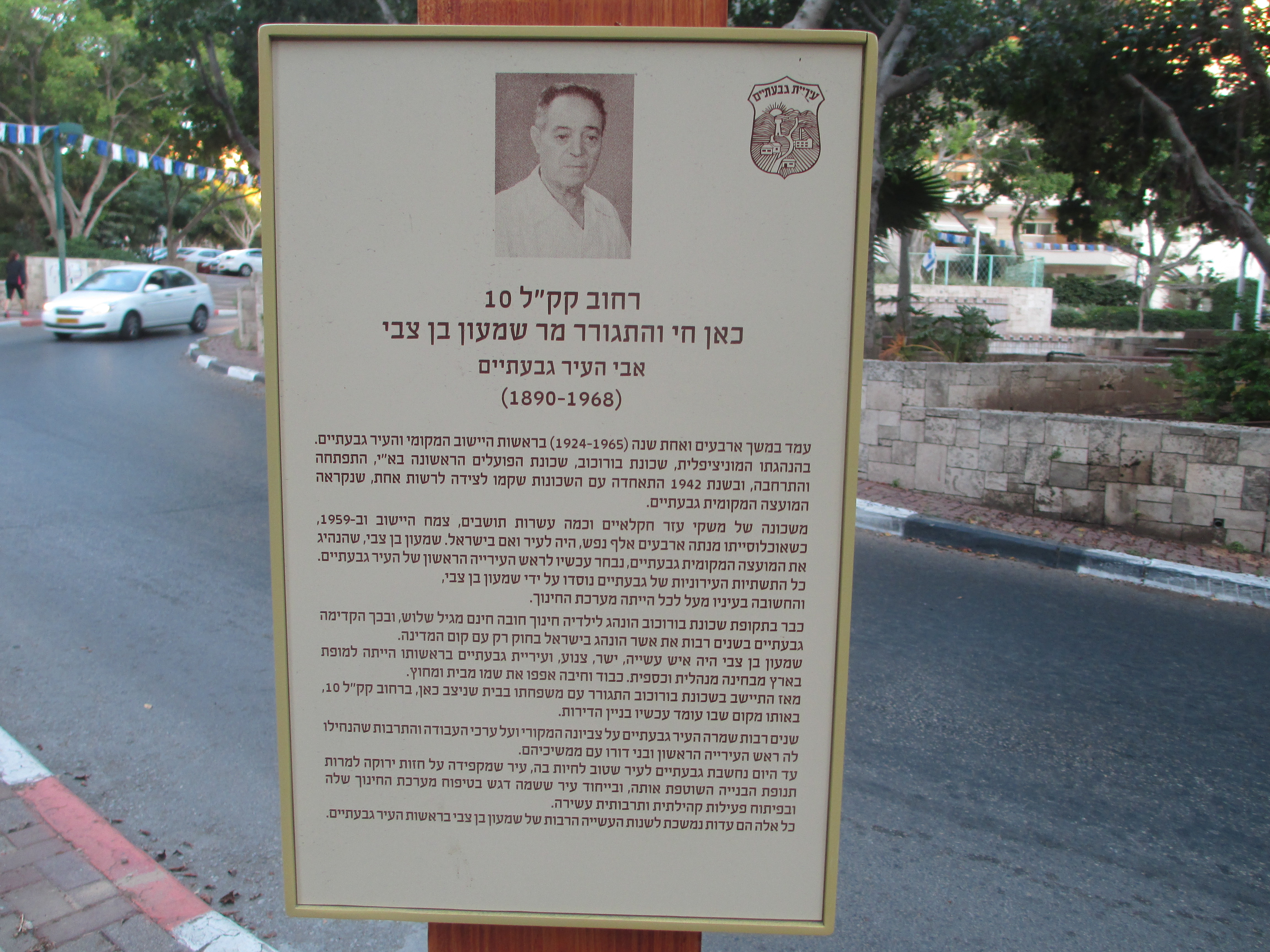 שלט זיכרון לשמעון בן צבי ליד המקום שעמד ביתו ברחוב קק"ל 10 בשכונת בורוכוב בגבעתיים